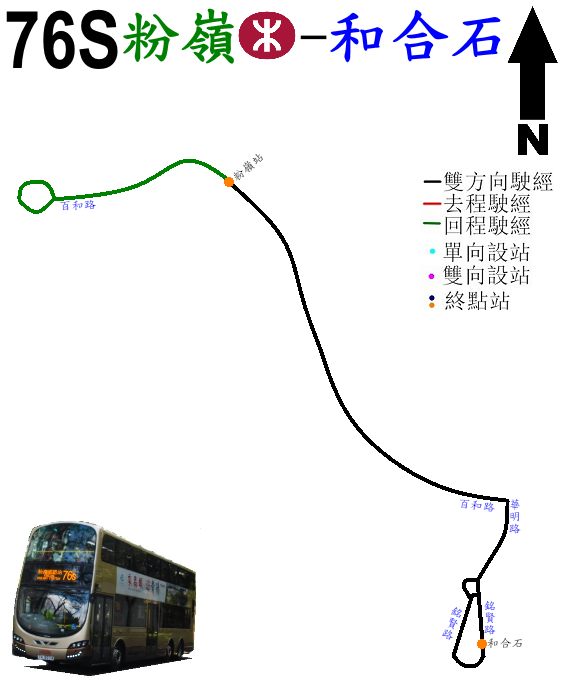 中文（香港）: 九巴76S線的走線圖